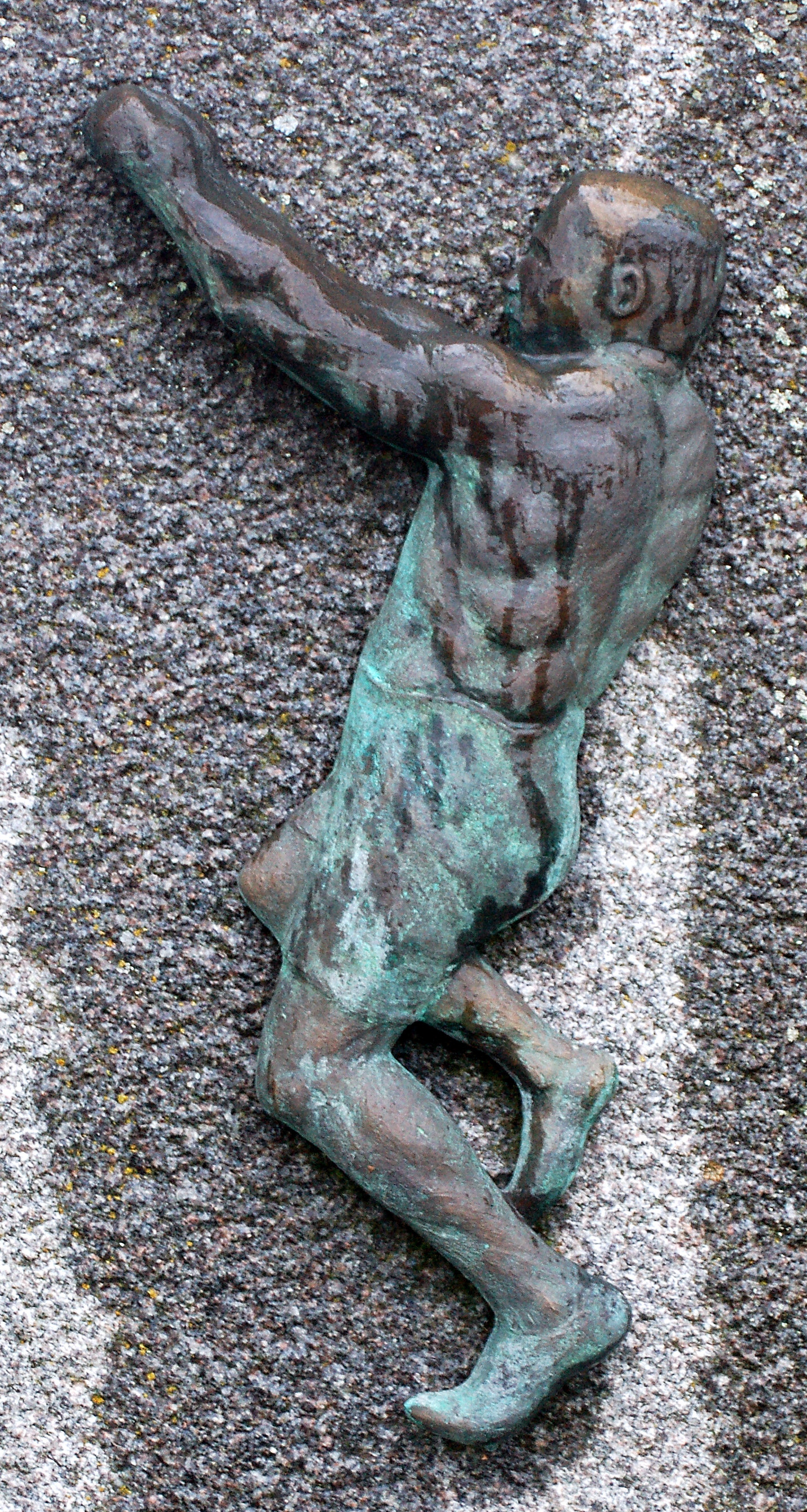 "Släggkastaren Massa Lind" utförd av Niki Merimaa 2004 placerad på Tingvalla IP, Klara, Karlstad.